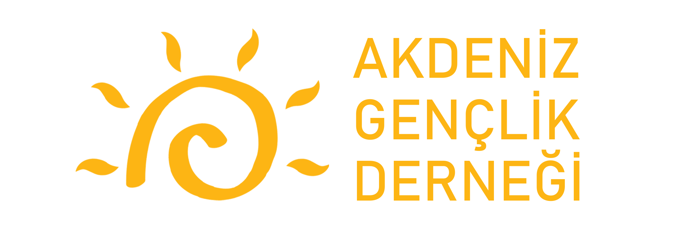 Akdeniz Gençlik Derneği logo